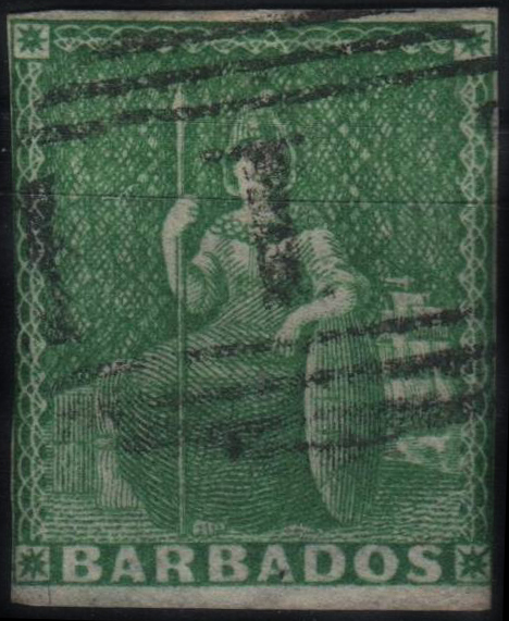 Первая почтовая марка Барбадоса